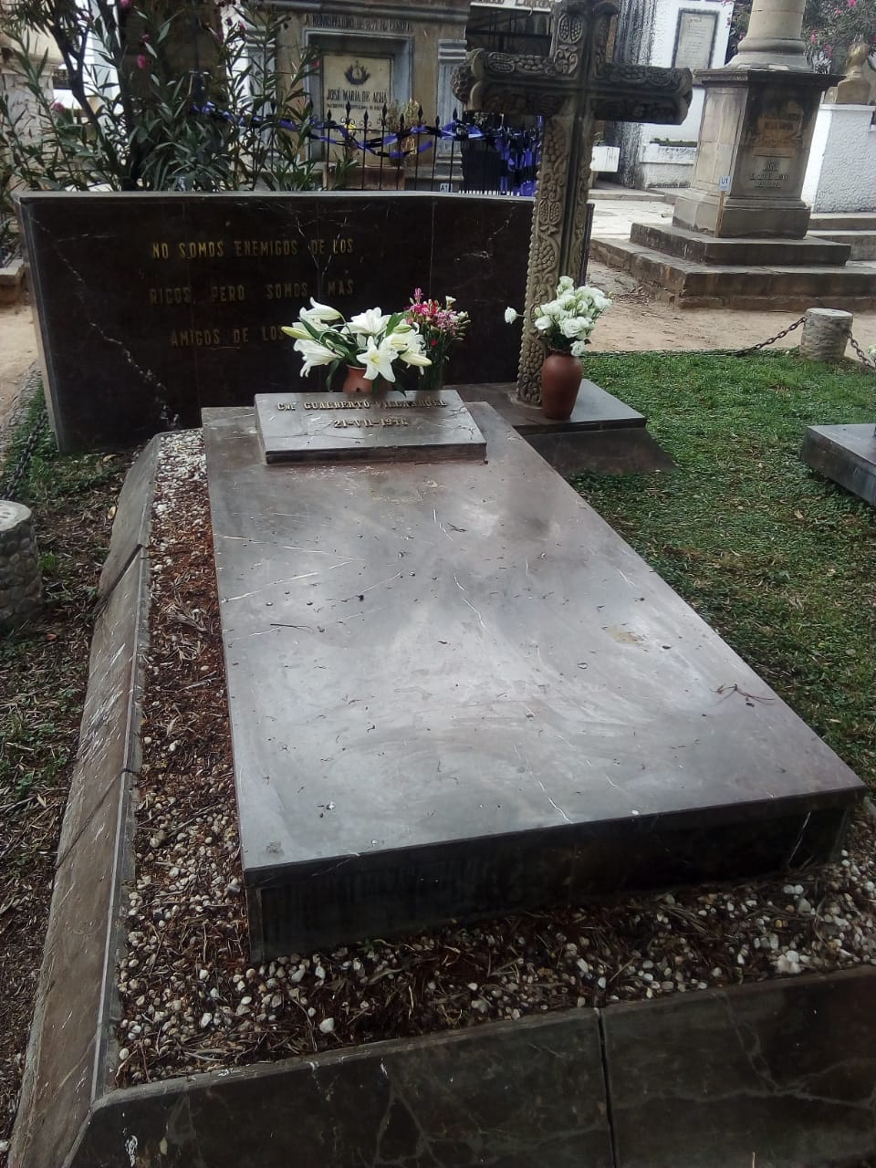 Tumba de Gualberto Villarroel se encuentra en el cementerio general de Cochabamba.